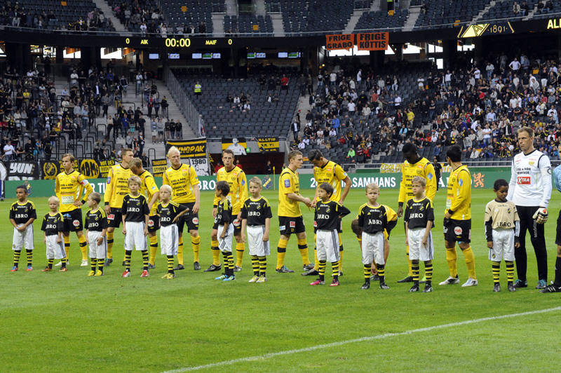 Mjällby AIF